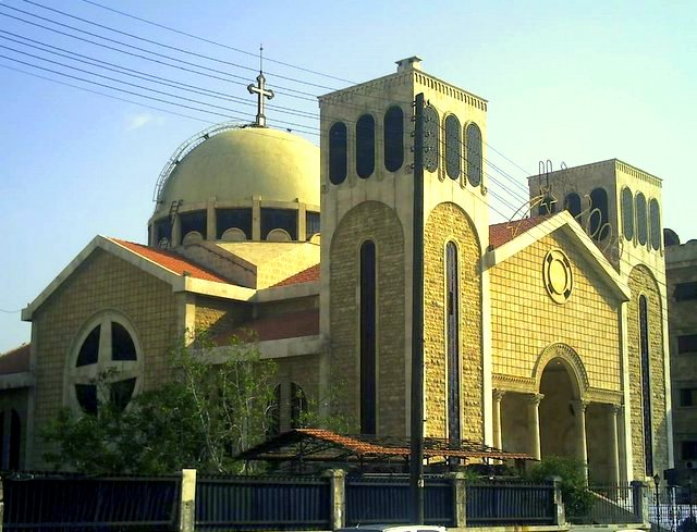 Aleppo, Syria.